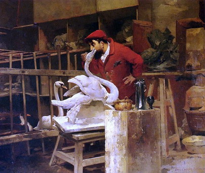 Louis Robert Carrier-Belleuse (1848-1913) The Animal Sculptor.jpg